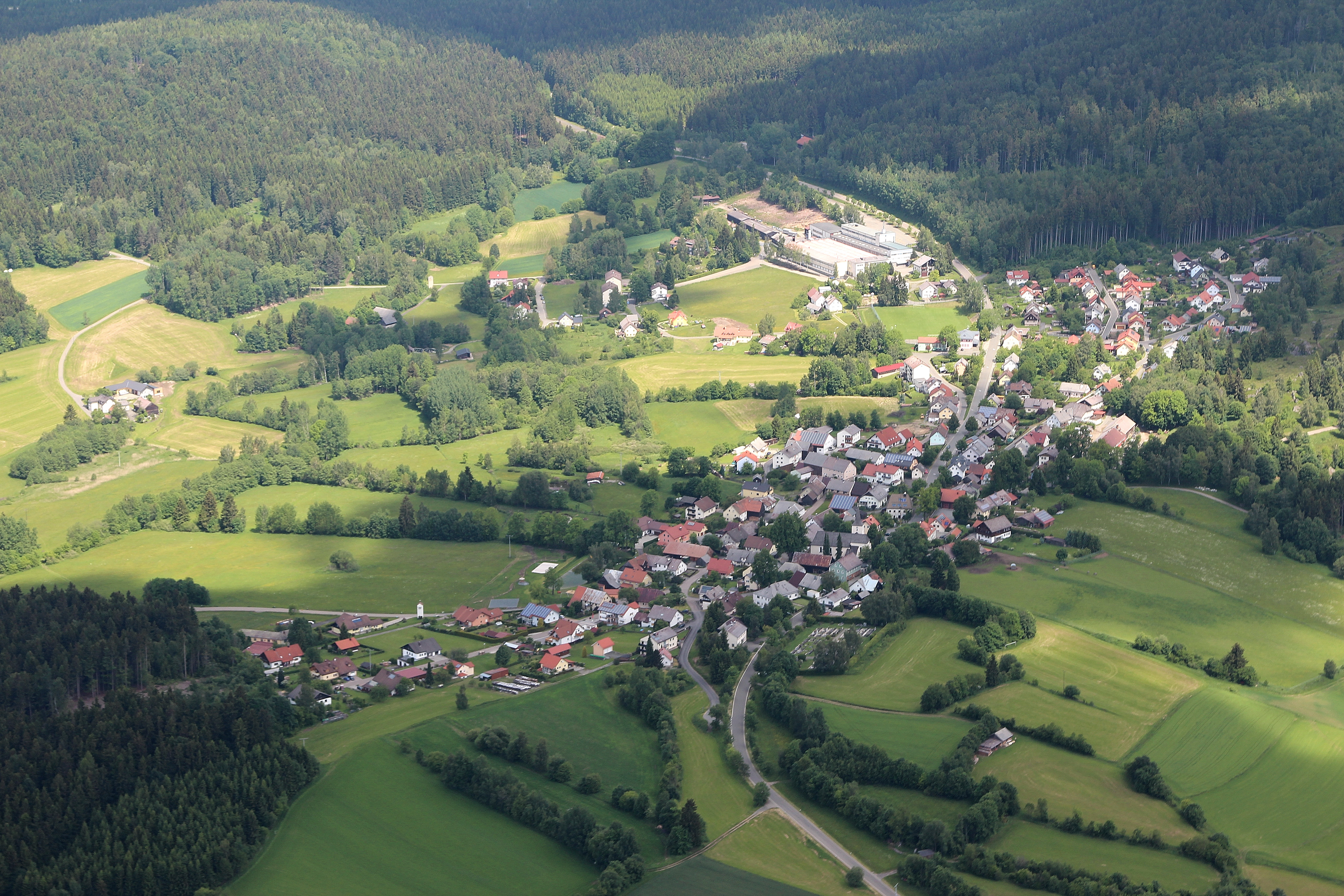 Stadlern, Landkreis Schwandorf, Oberpfalz, Bayern